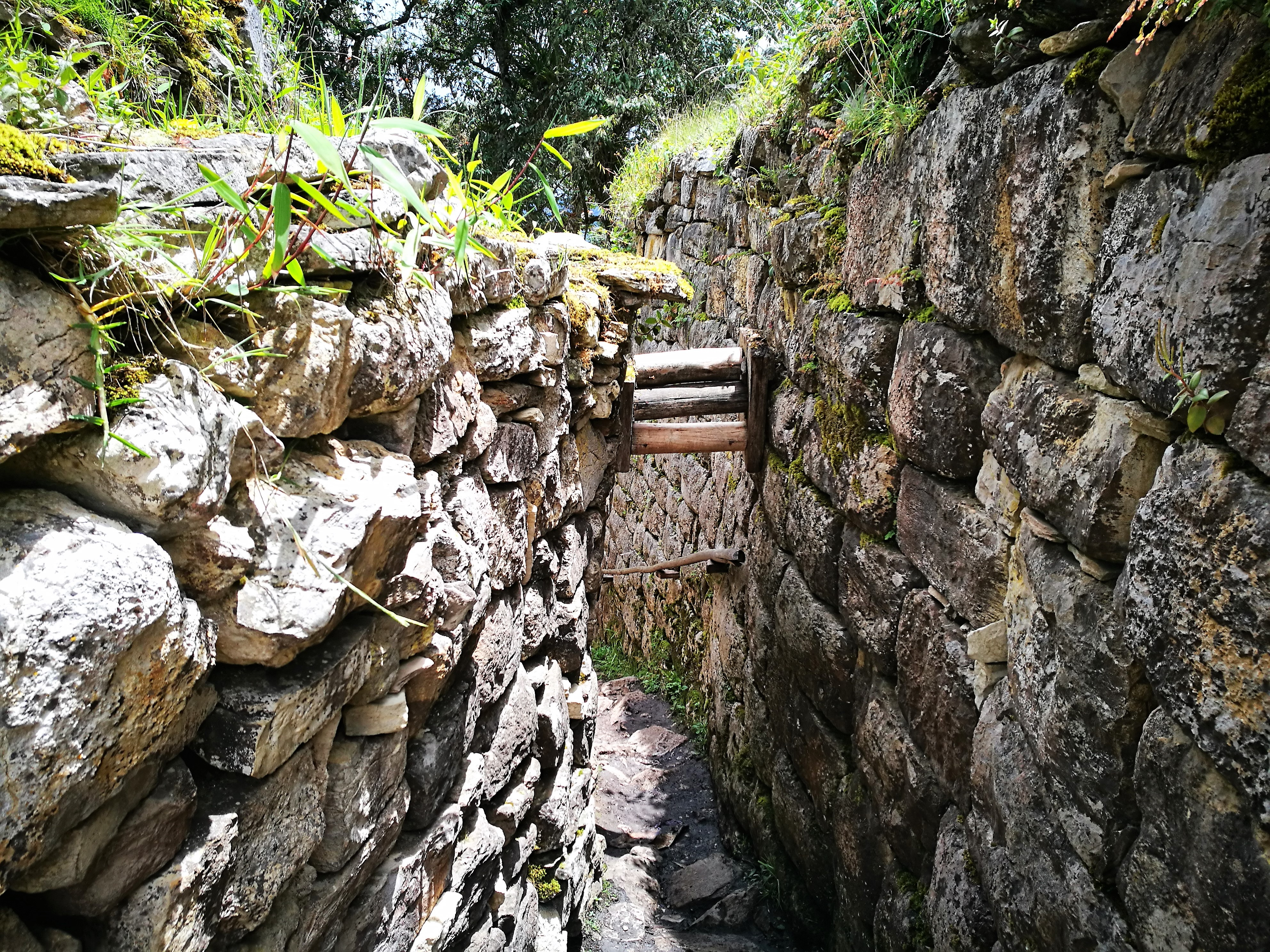 Porta de les Ruïnes de Kuelap